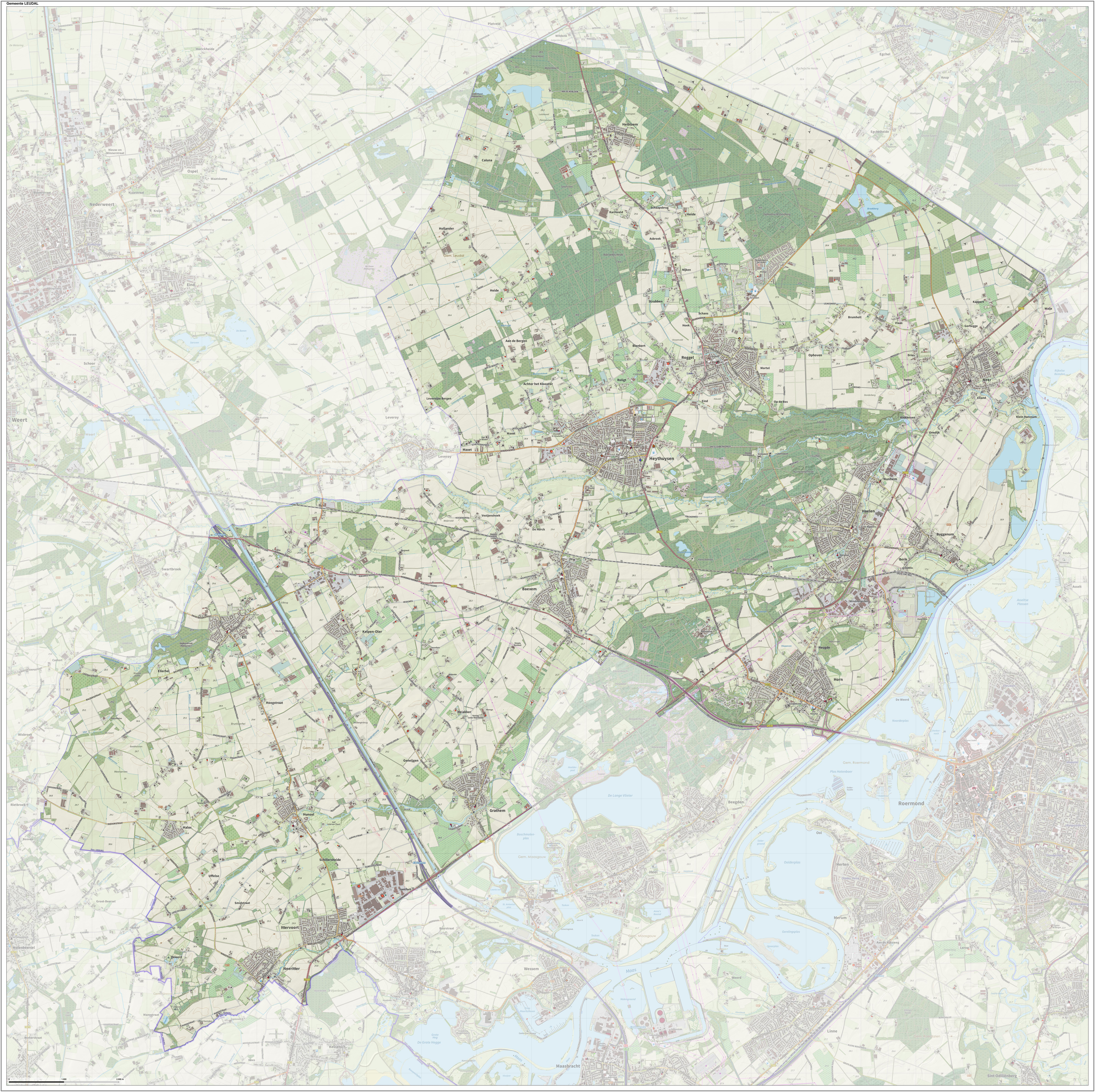 Topografische gemeentekaart. Resolutie: 400 pixels/km. Kaartbeeld samengesteld uit de open geodata van de Top10NL en Top25namen (Kadaster), Creative Commons-BY licentie. Gebouwvlakken uit open geodata BAG extract. Wegen uit de OpenStreetMap, OpenStreetMap community. Reliëfschaduw uit de Actuele Hoogtekaart AHN2. Samenstelling en kleurenschema: Jan-Willem van Aalst, met QGIS. Zie ook de Legenda.